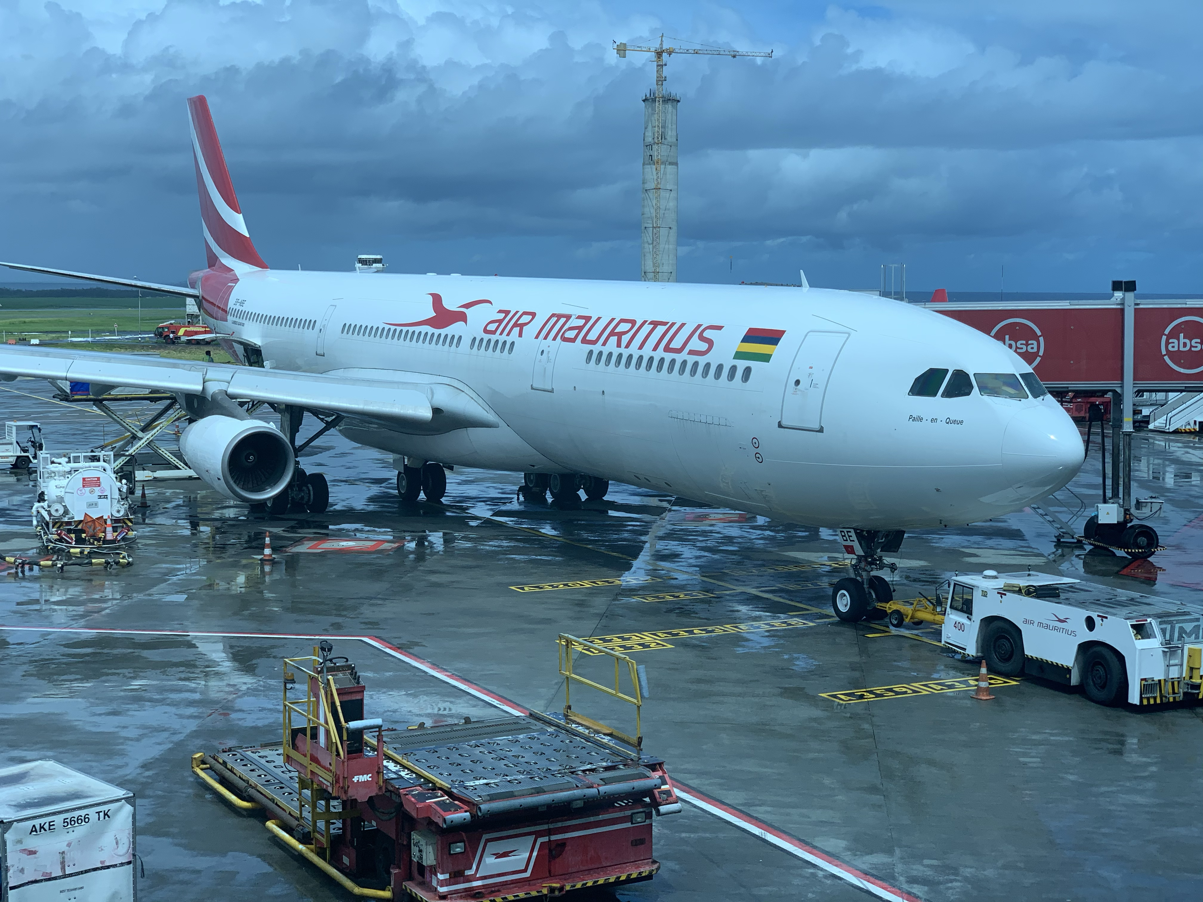 Avion d'Air Mauritius à l'aéroport international de Maurice.